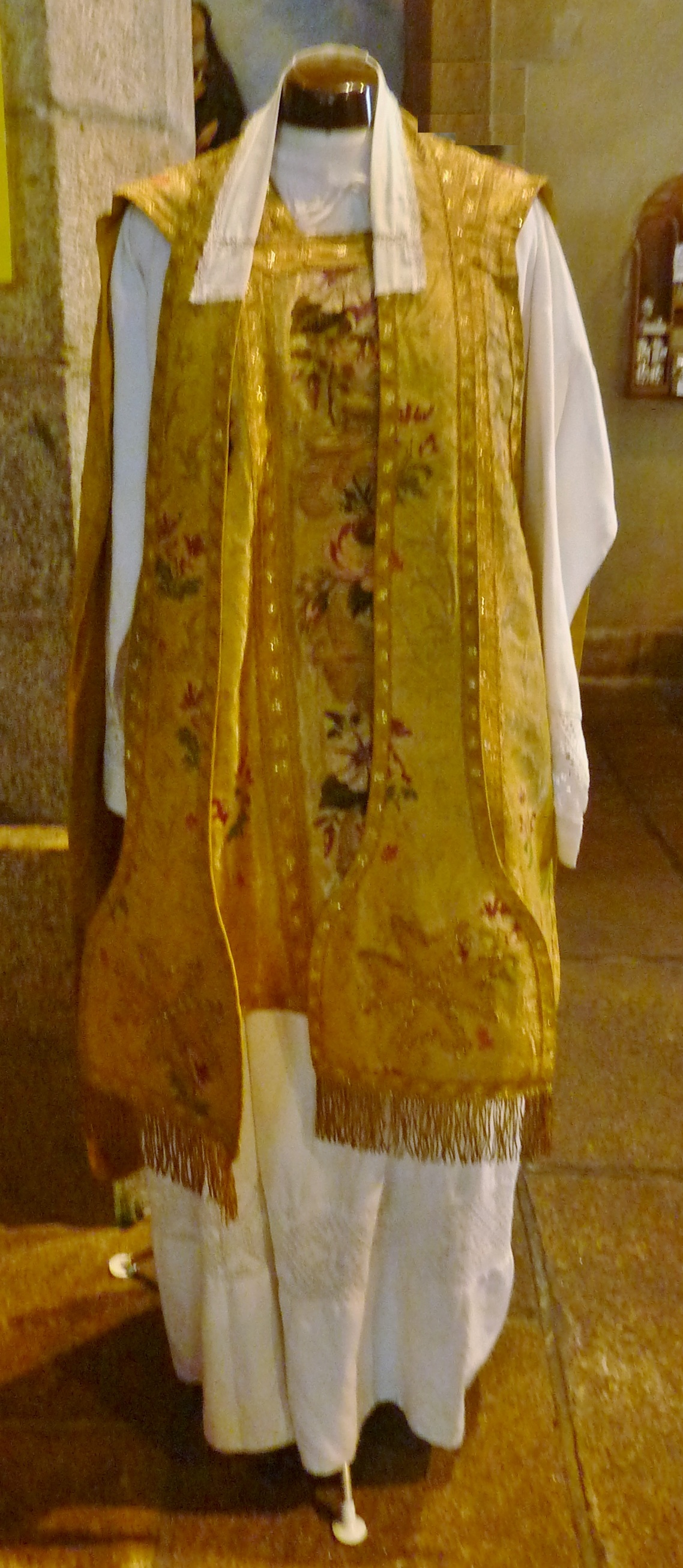 Port-Launay, église paroissiale : chasuble offerte par l'emperuer Napoléon III et l'imératrice Eugénie en 1858 lors de leur passage à l'occasion de l'inauguration de l'écluse maritime de Guily-Glaz. Elle est inscrite sur l'inventaire supplémentaire des objets mobiliers classés.